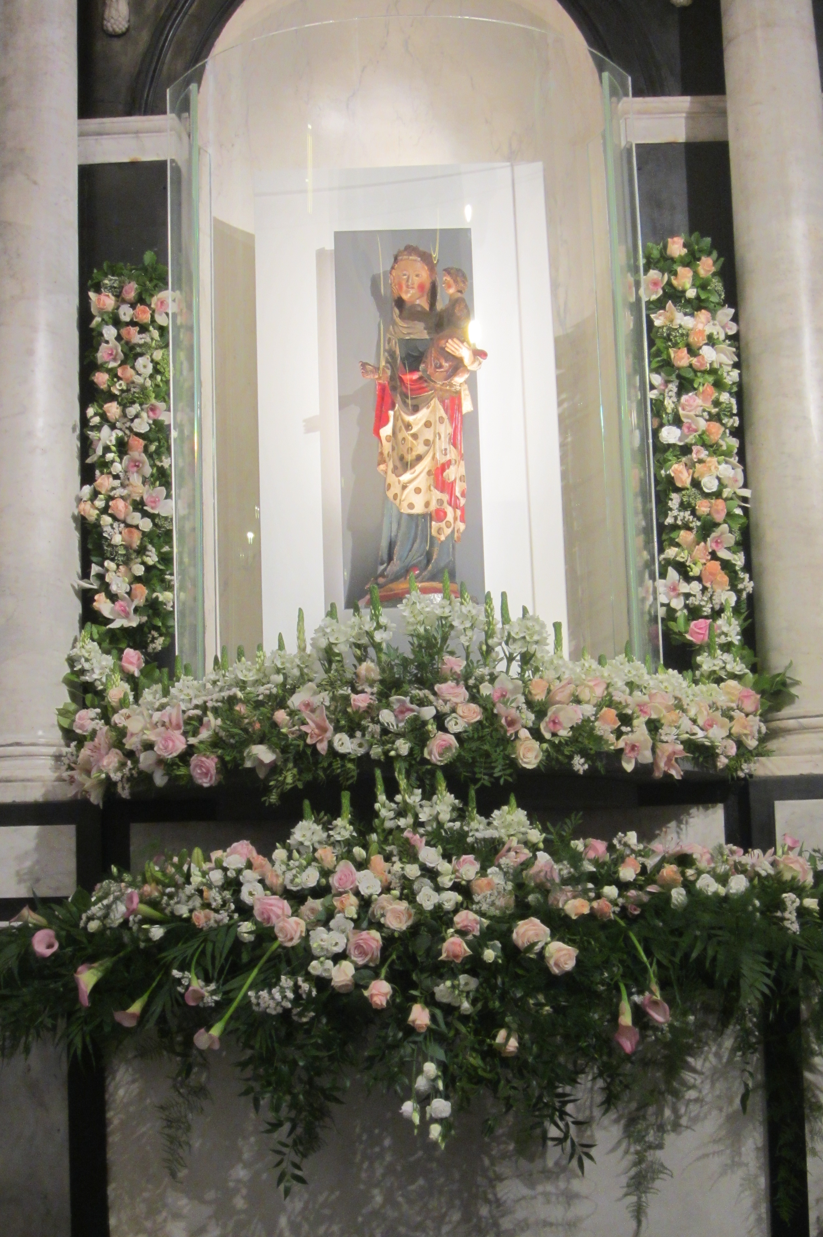 Virga Jesse in de O.L.Vrouwebasiliek te Hasselt tijdens de Zevenjaarlijkse Feesten, 2017